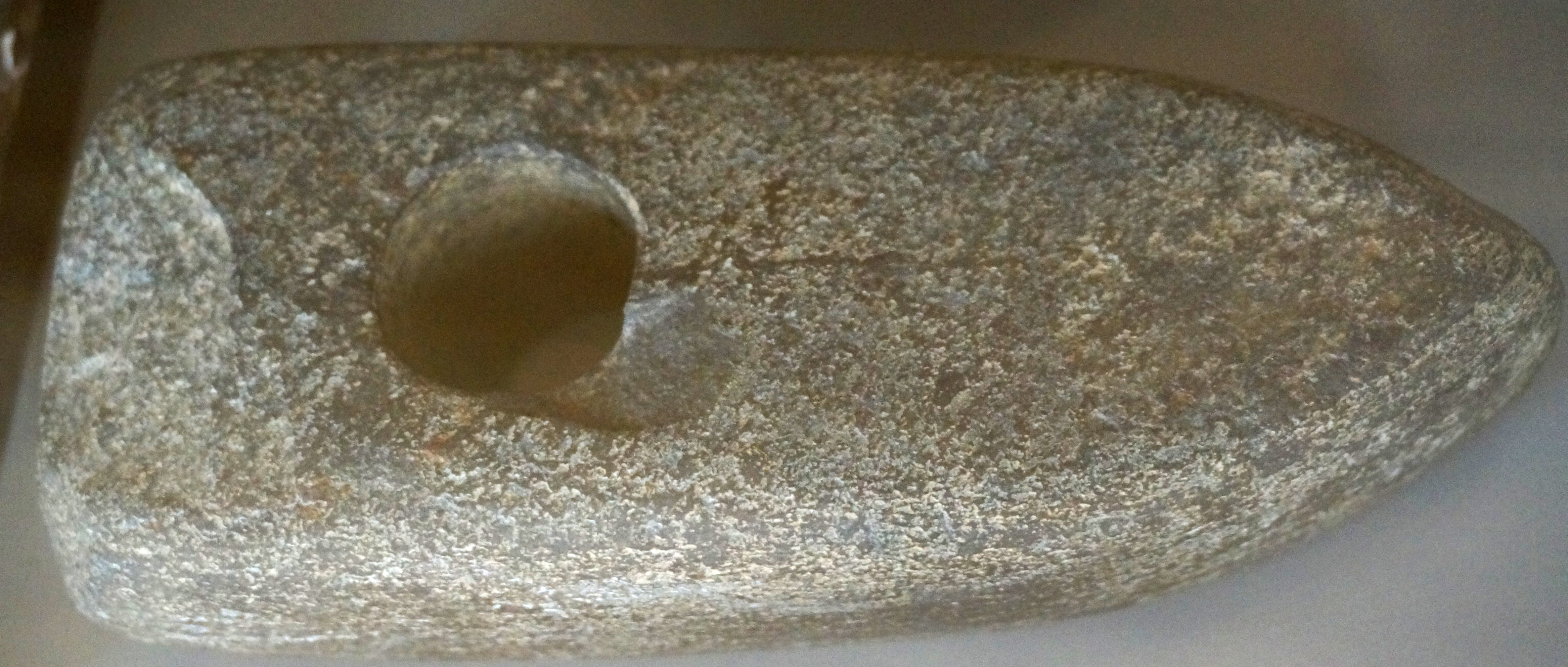 Présenté au musée de st-Dizier .